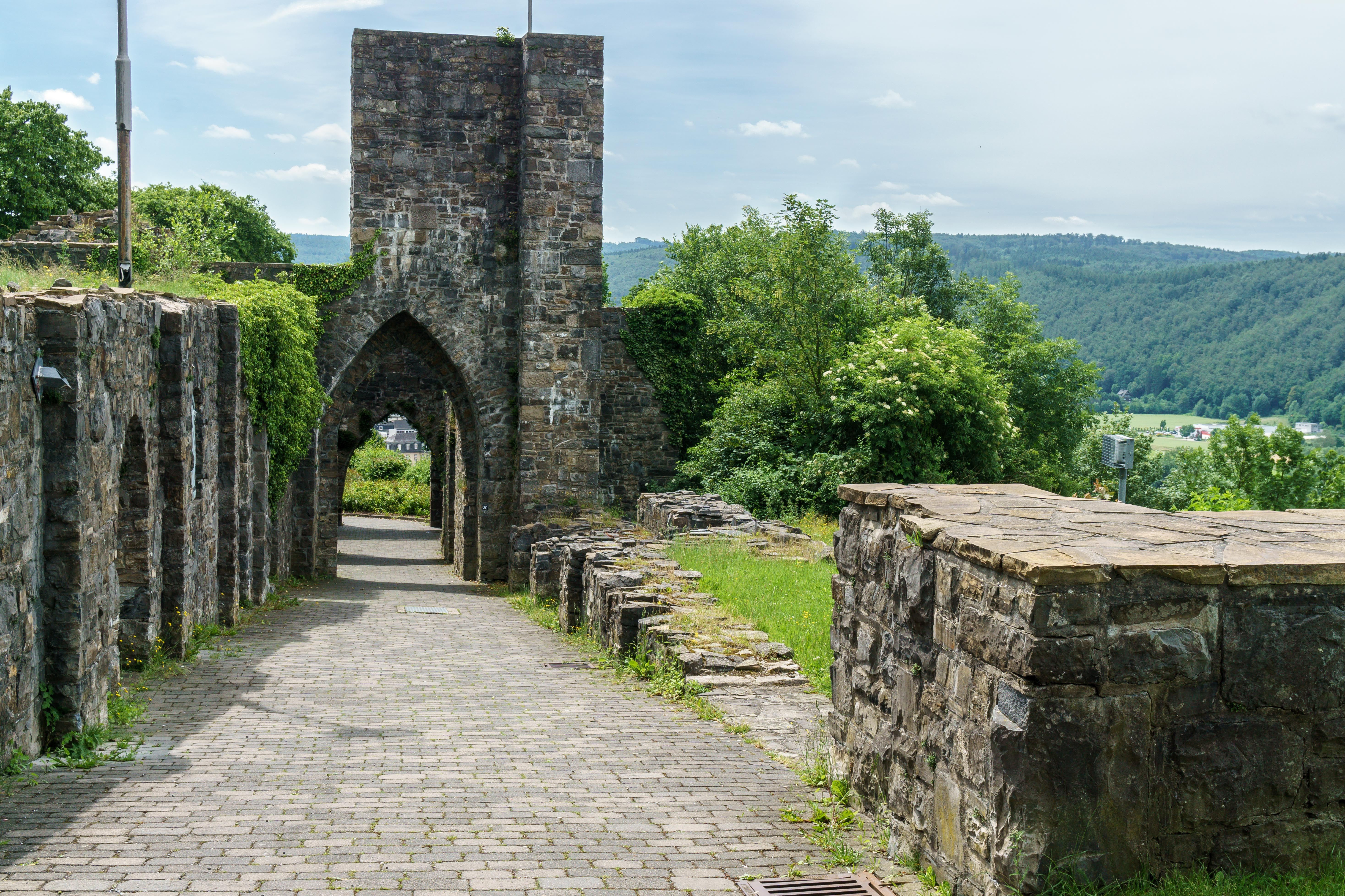 Schloss Arnsberg (Ruine) Zufahrt zum früheren Westturm, Ansicht vom Schlossplateau